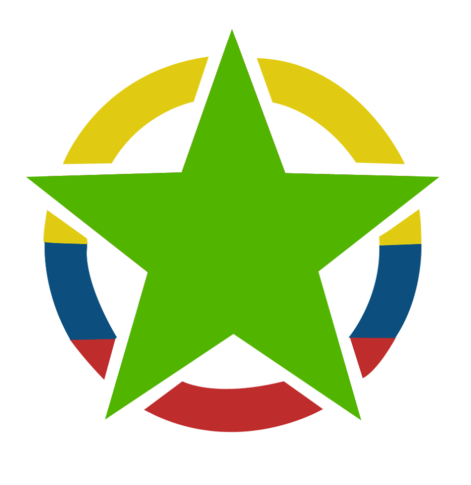 Jen la oficiala ikono de la Kolombia Esperanto-ligo